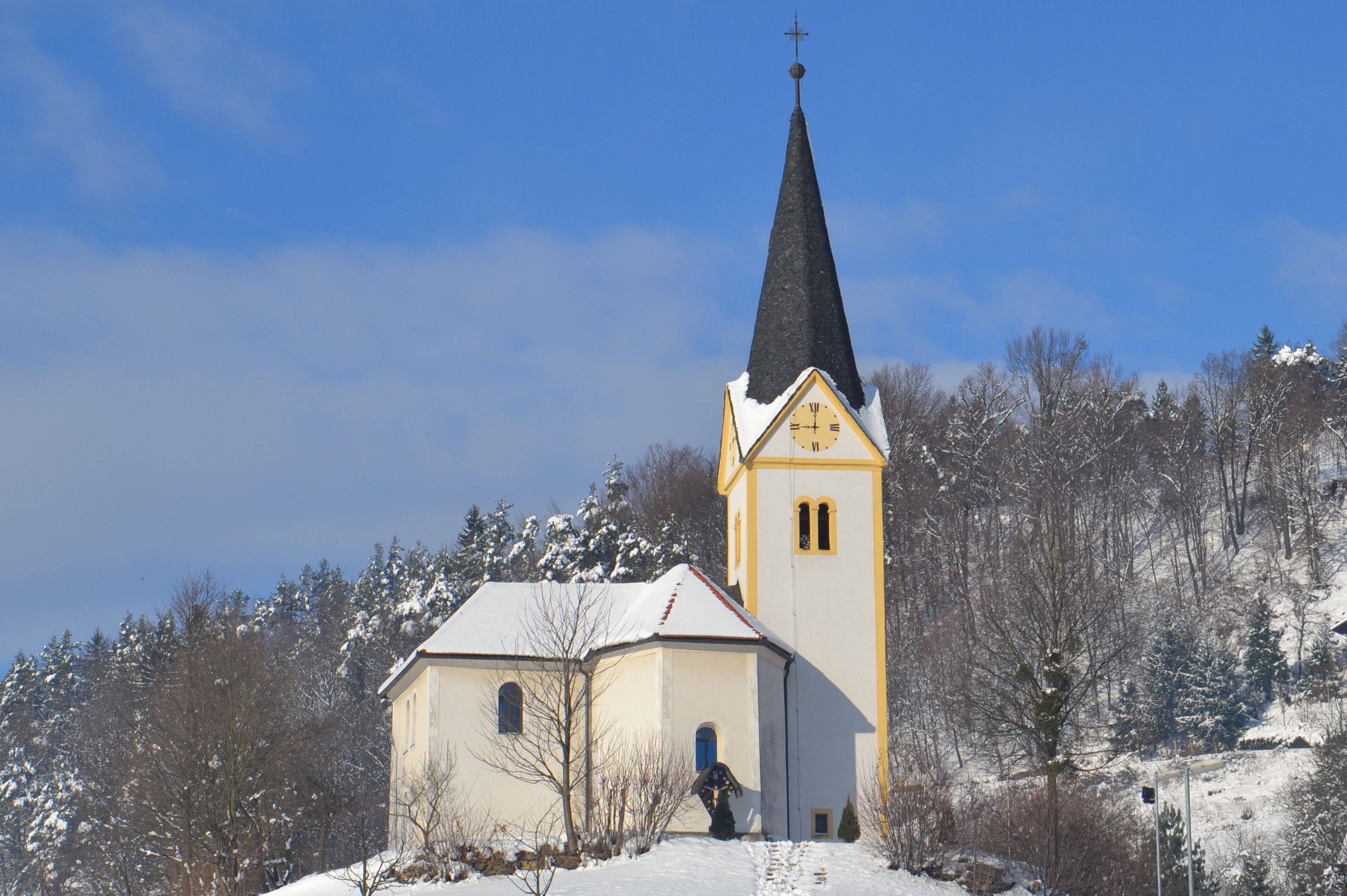 Cerkev sv. Urbana pozimi